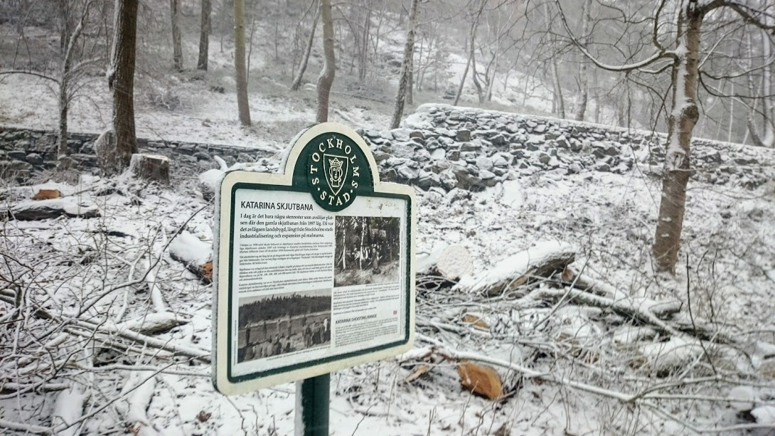 Katarina Skjutbana i Björkhagen bredvid Malmövägen.